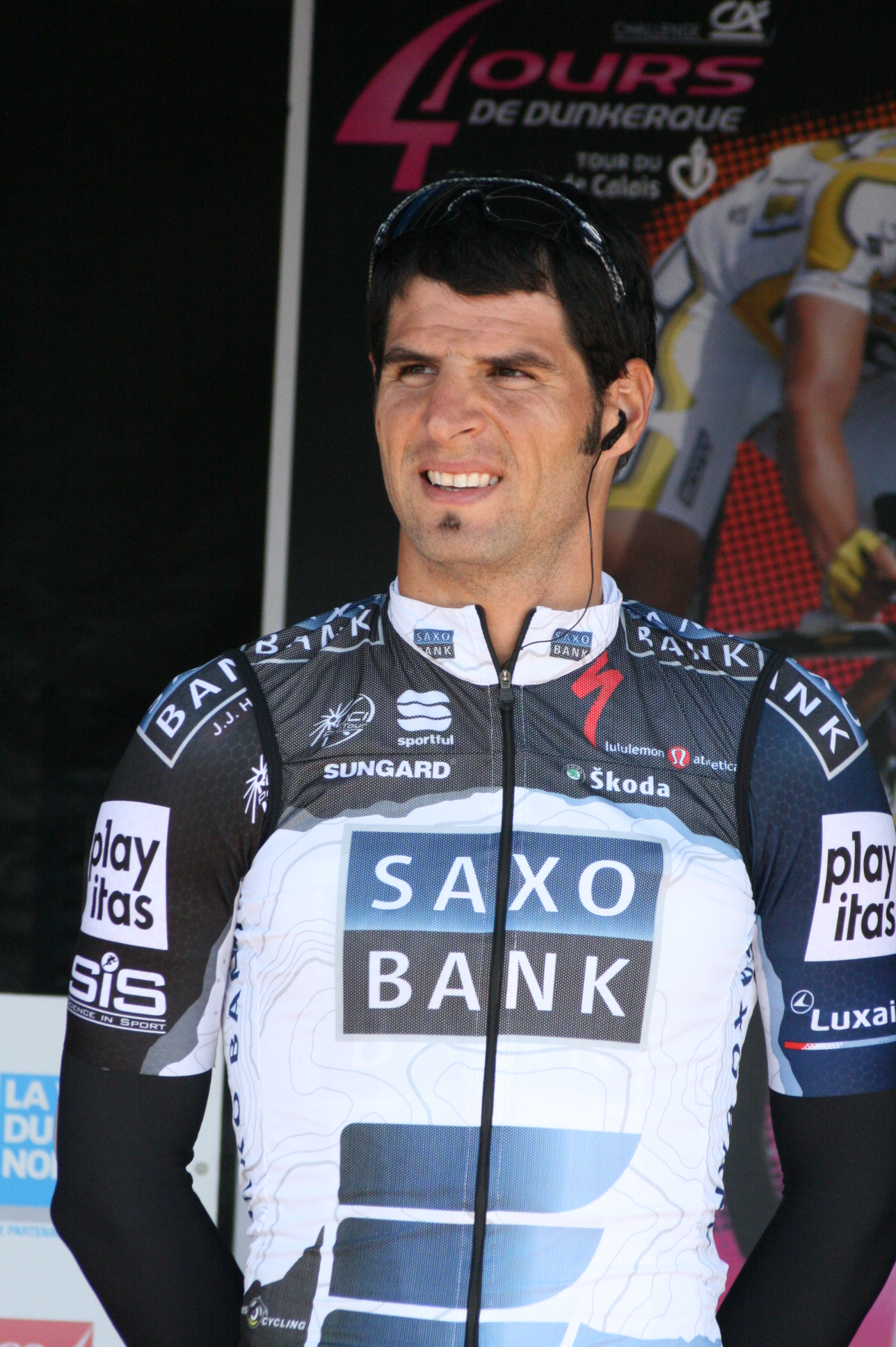 Juan José Haedo lors de la présentation des équipes des 4 jours de Dunkerque